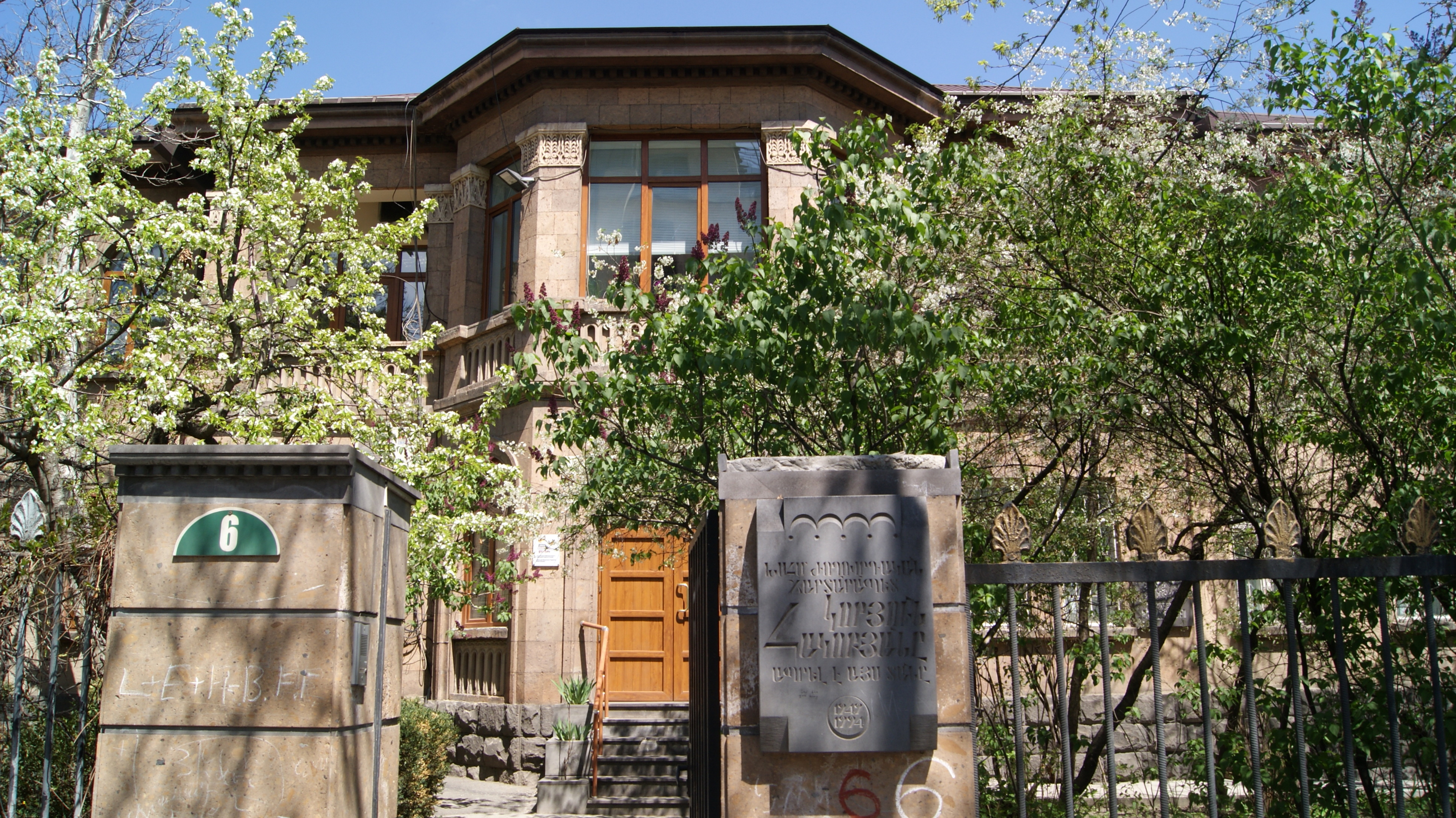 Koryun Hakobyan's plaque on Baghramyan avenue